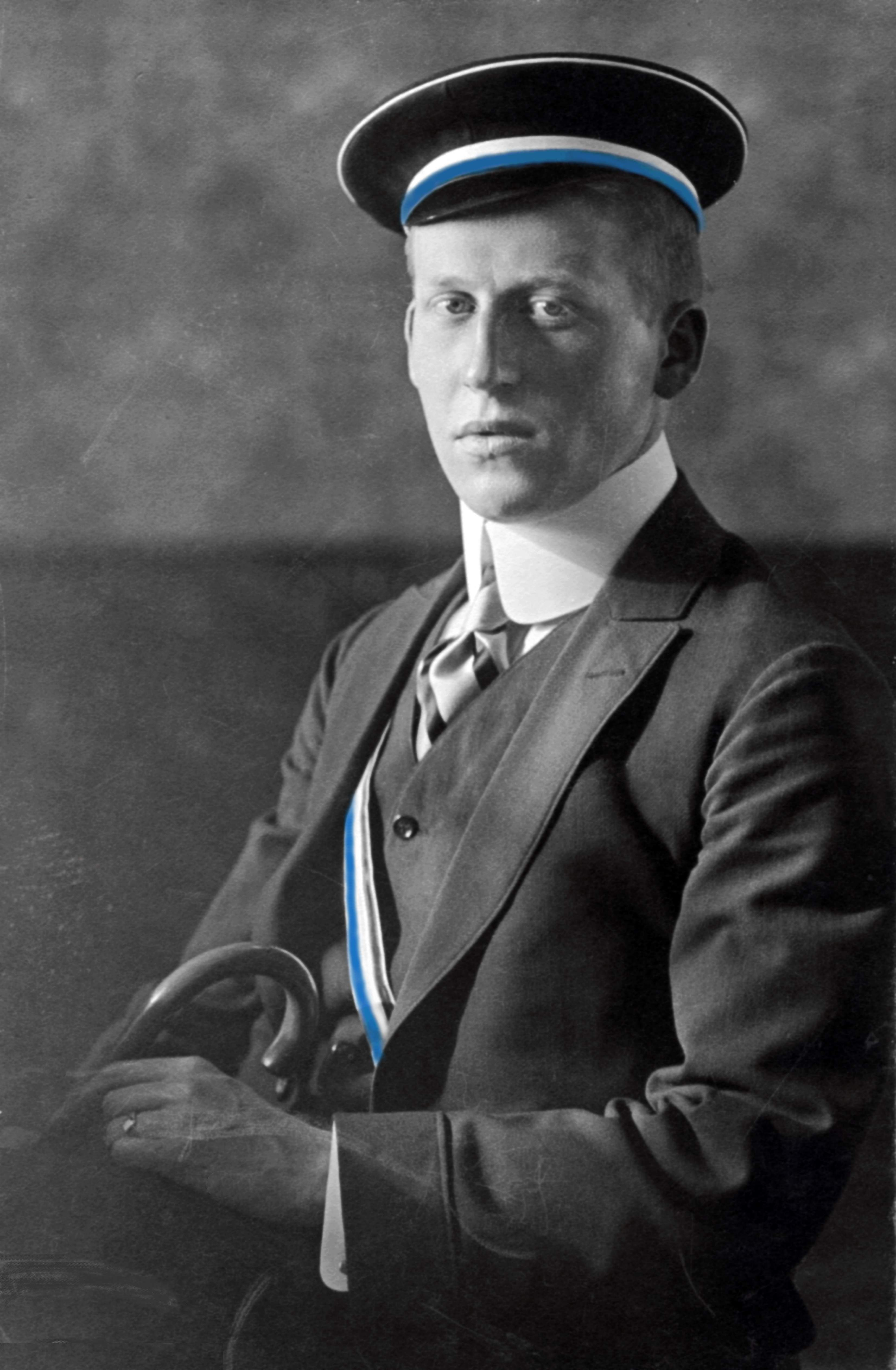 August Jäger als Corpsbursche des Corps Suevia München